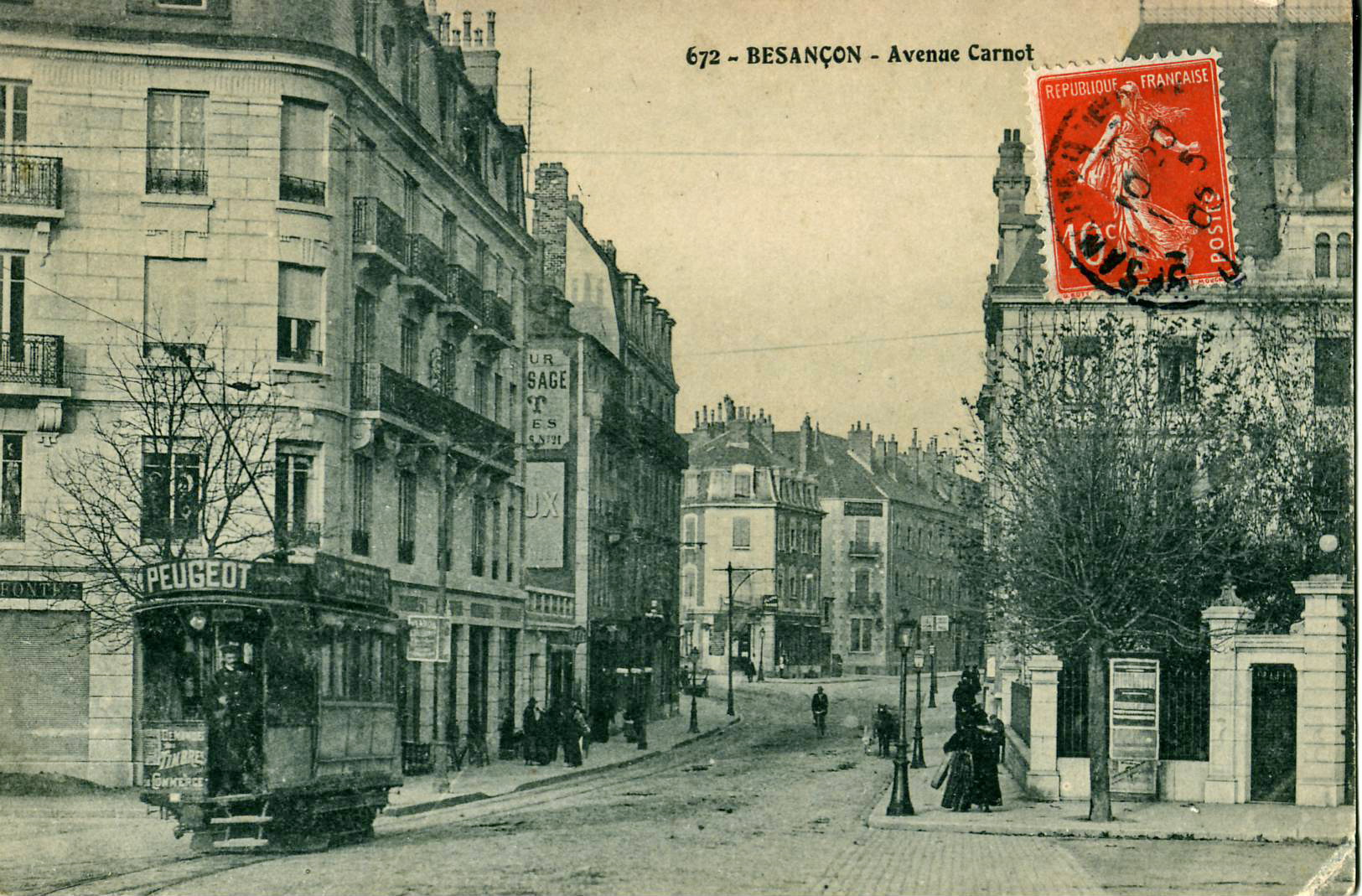 Carte postale ancienne sans mention d'éditeur, n°672 :BESANÇON - Avenue Carnot.Vue en gros plan d'une motrice de l'ancien tramway de Besançon